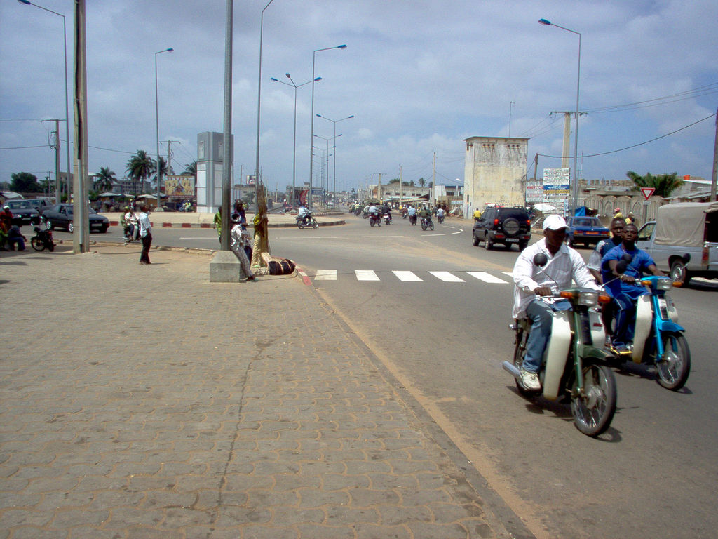 Cotonou, Benin